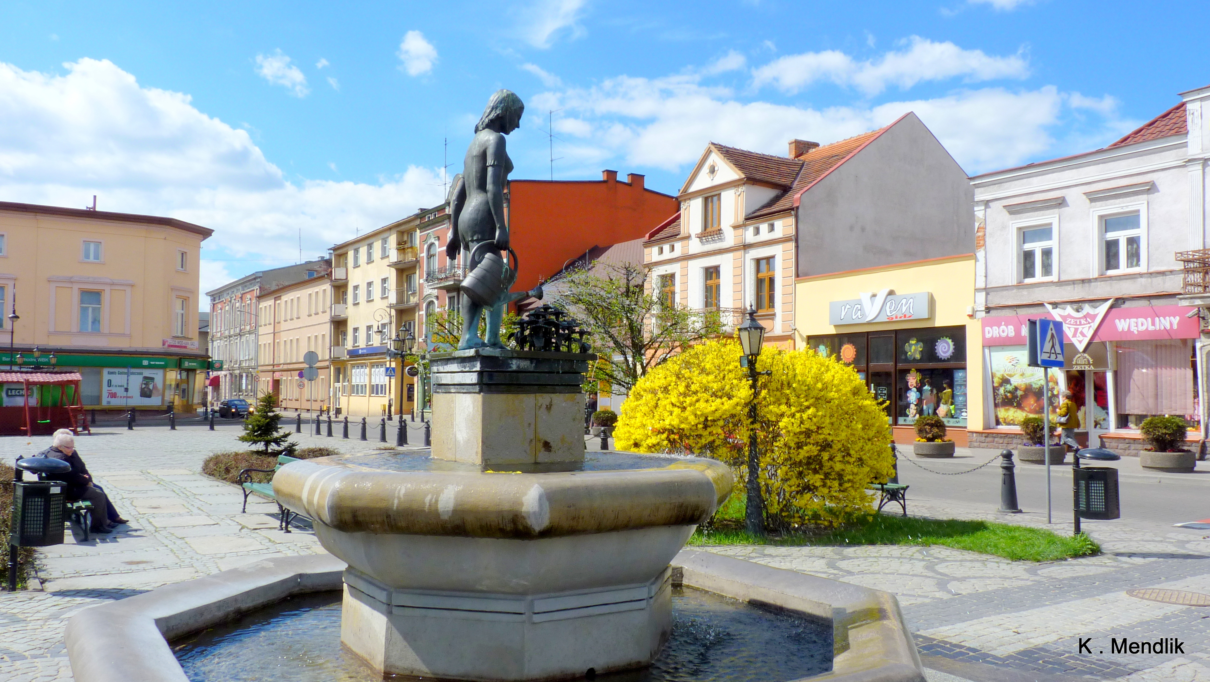 Nakło nad Notecią - Rynek